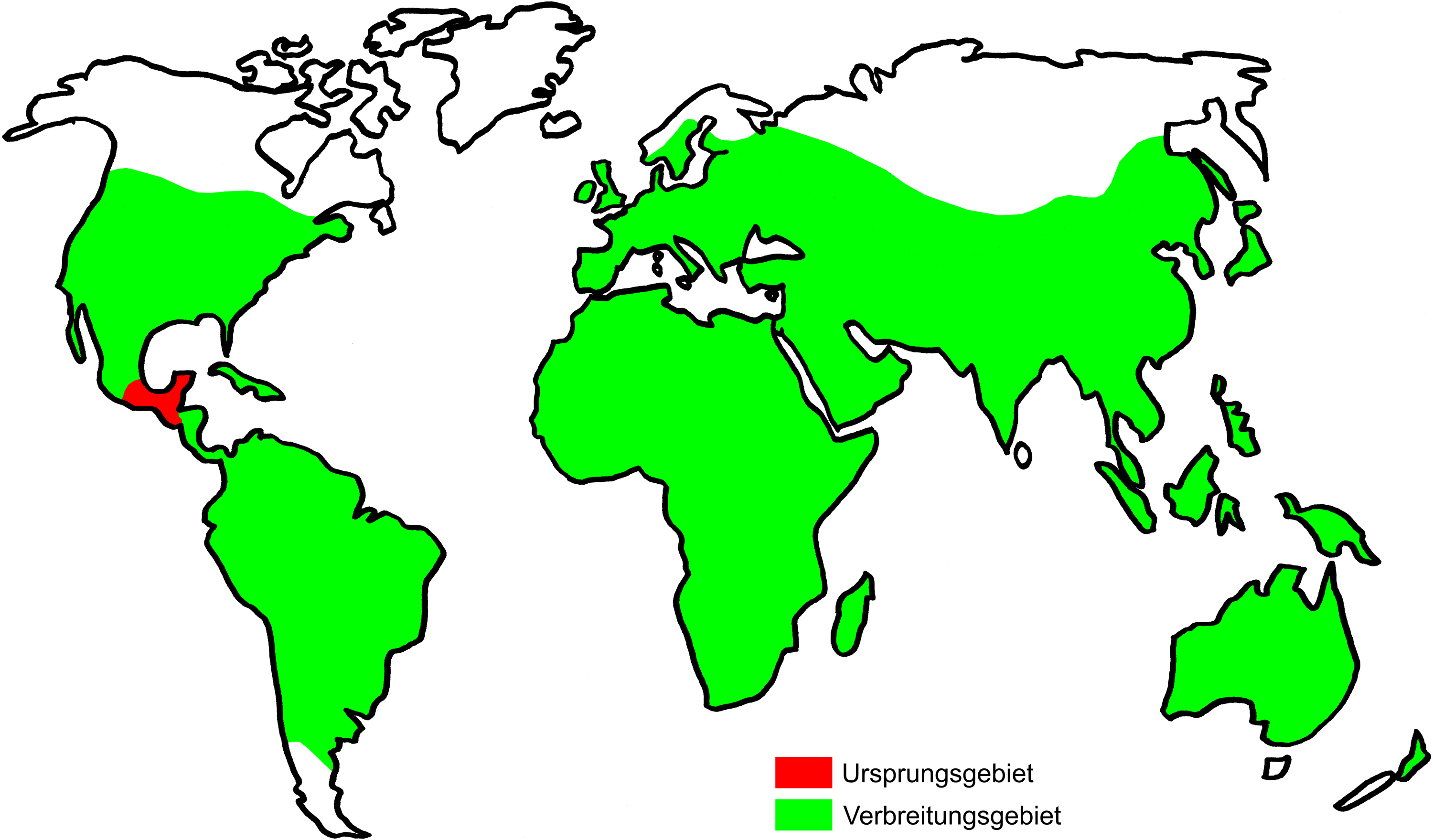 Ursprung und Verbreitung von Amaranth